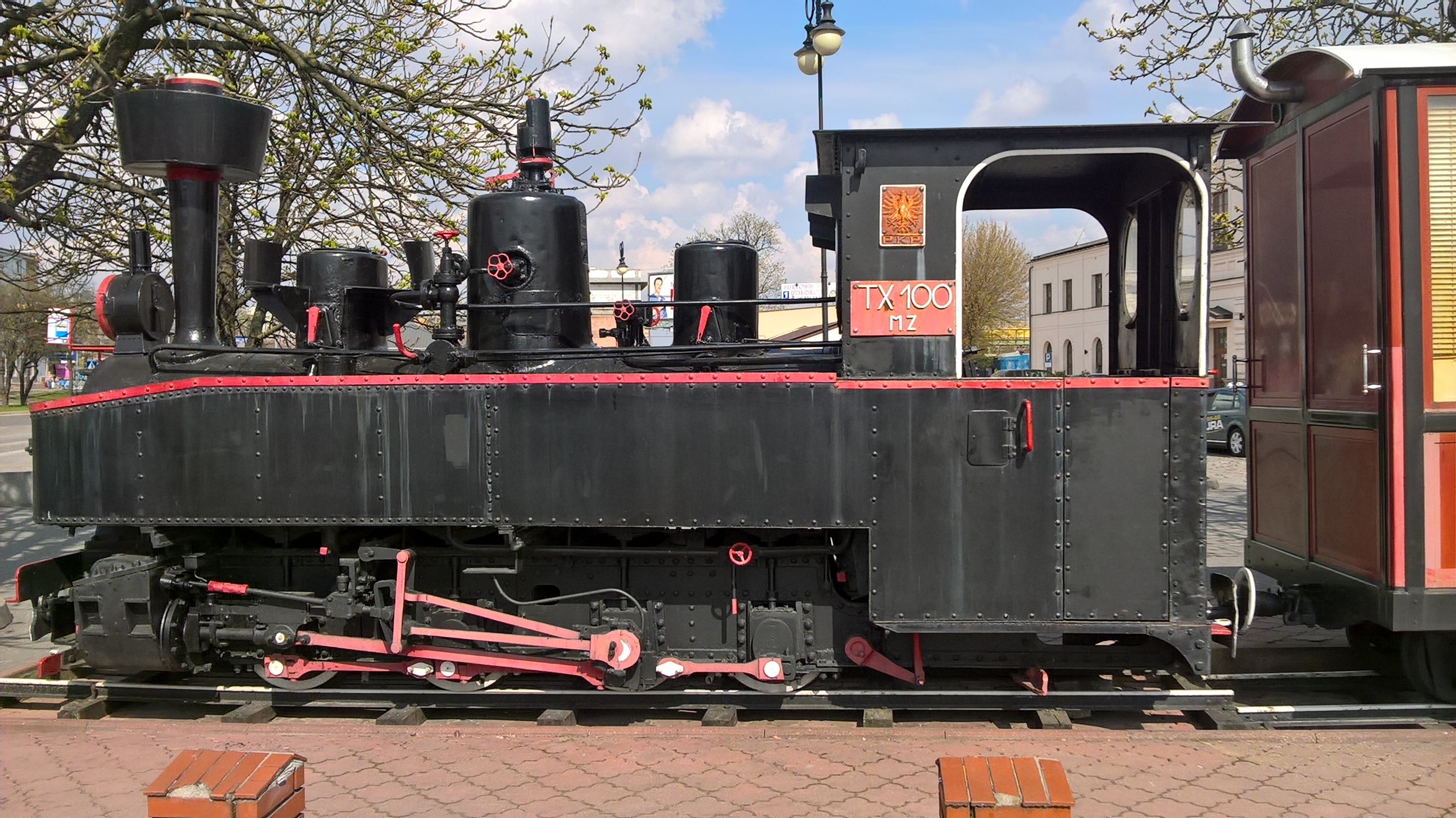 Parowóz wąskotorowy Tx 100 MZ przed dworcem kolejowym w Białymstoku.